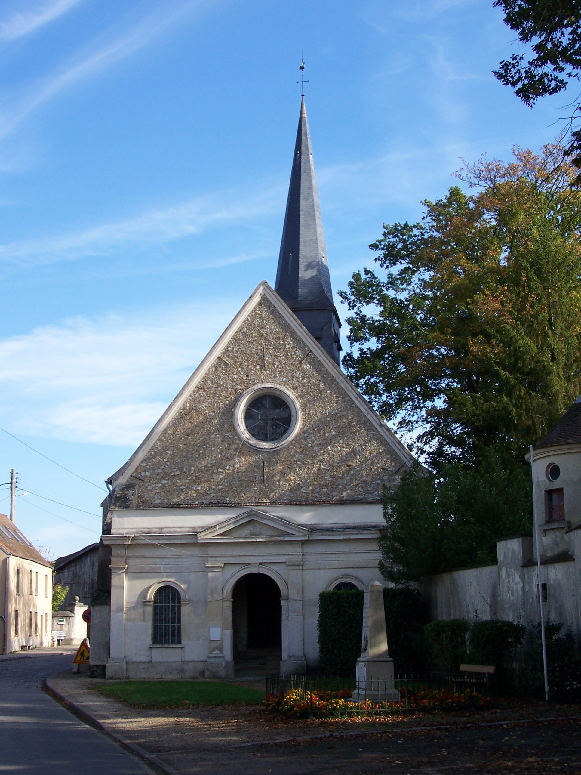 Église de Mareil-le-Guyon (Yvelines, France)